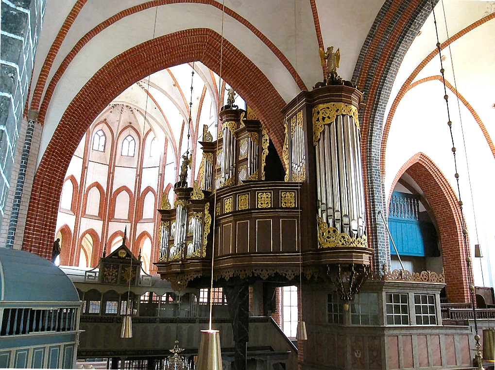 Prospekt der Arp-Schnitger-Orgel in der Ludgerikirche in Norden (Ostfriesland)